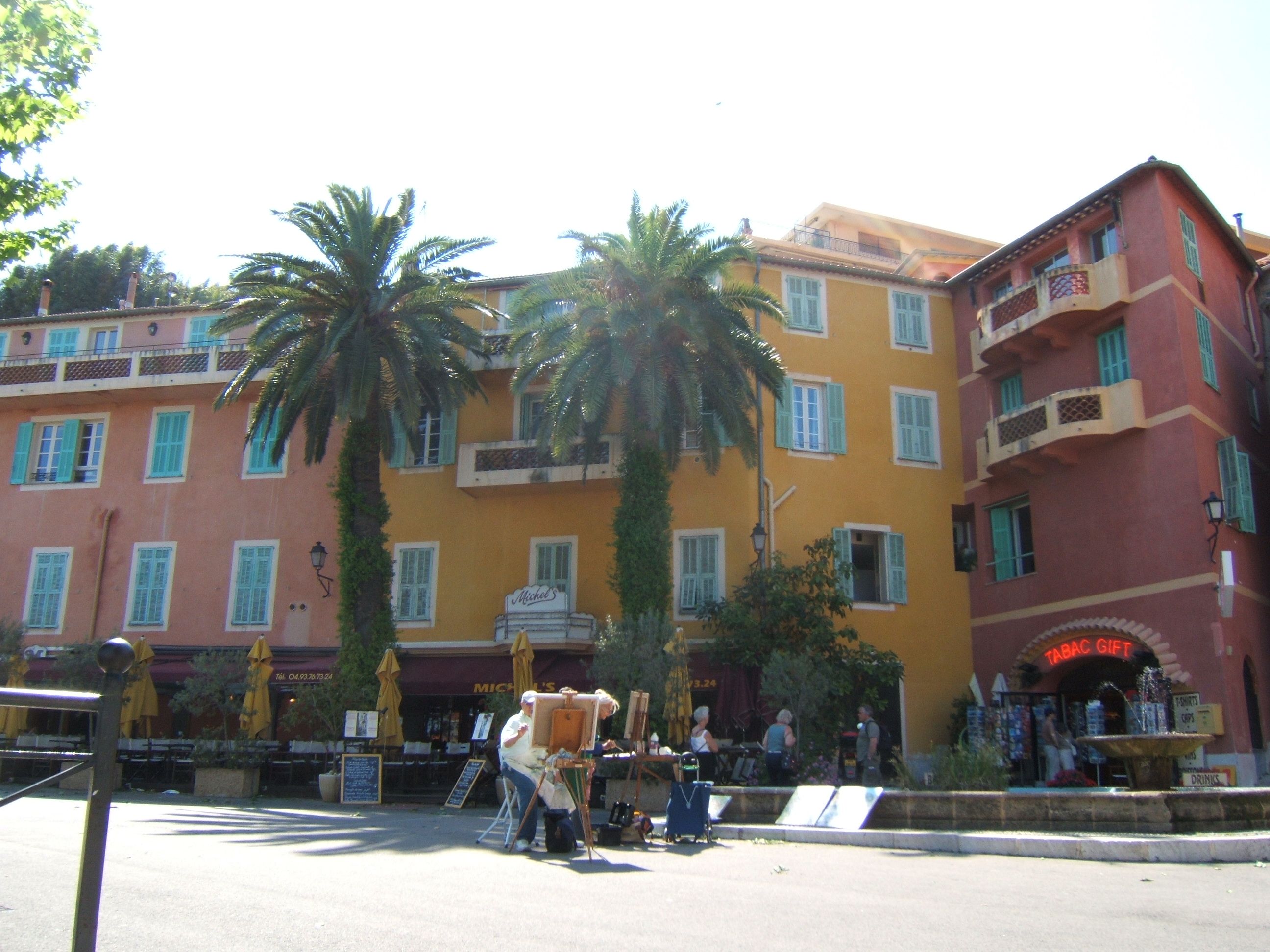 Façades multicolores, soleil, palmiers et artiste peintre : il ne manque rien au décor à Villefranche-sur-Mer (06).